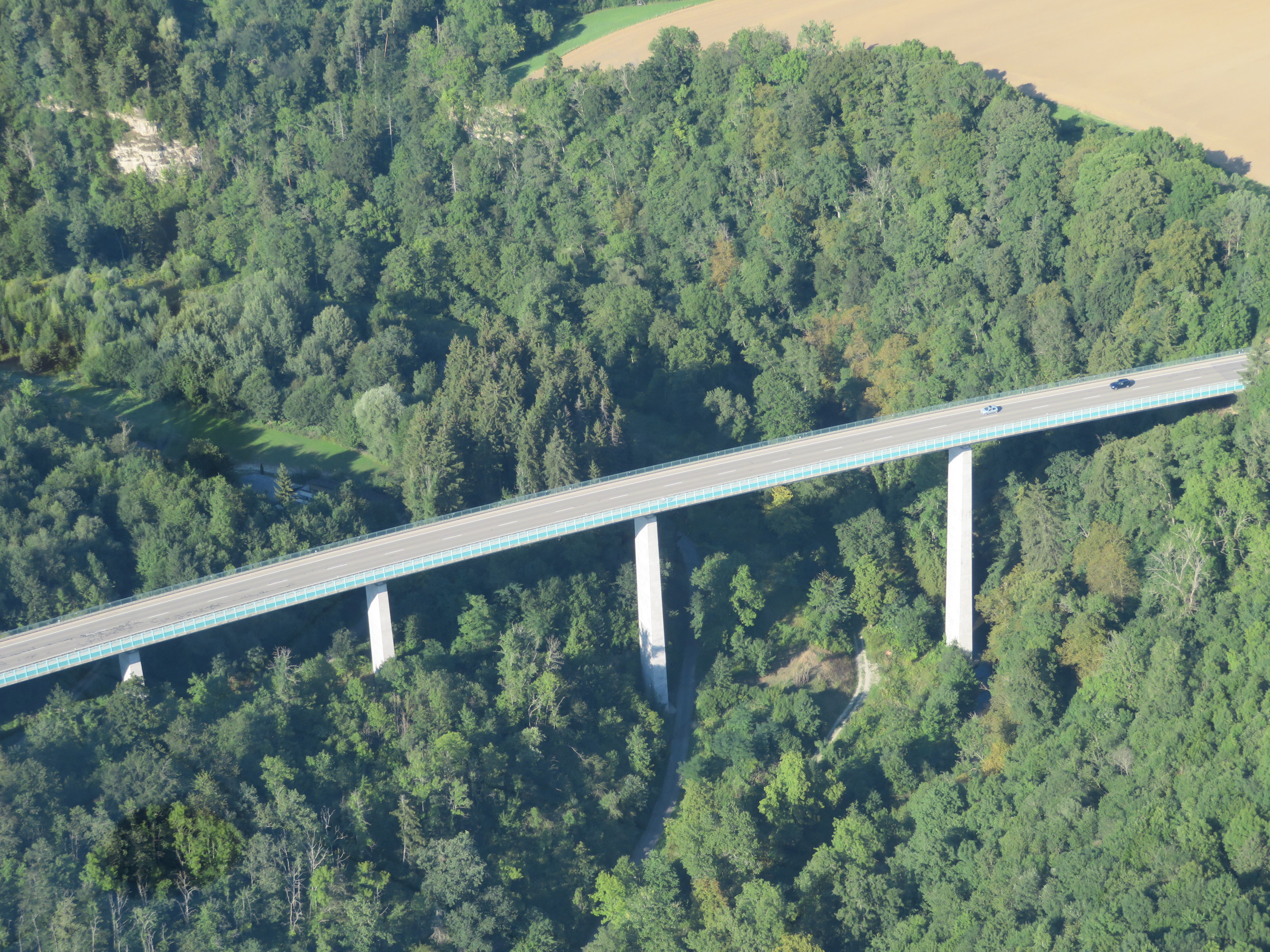 Blick vom thyssenkrupp Testturm